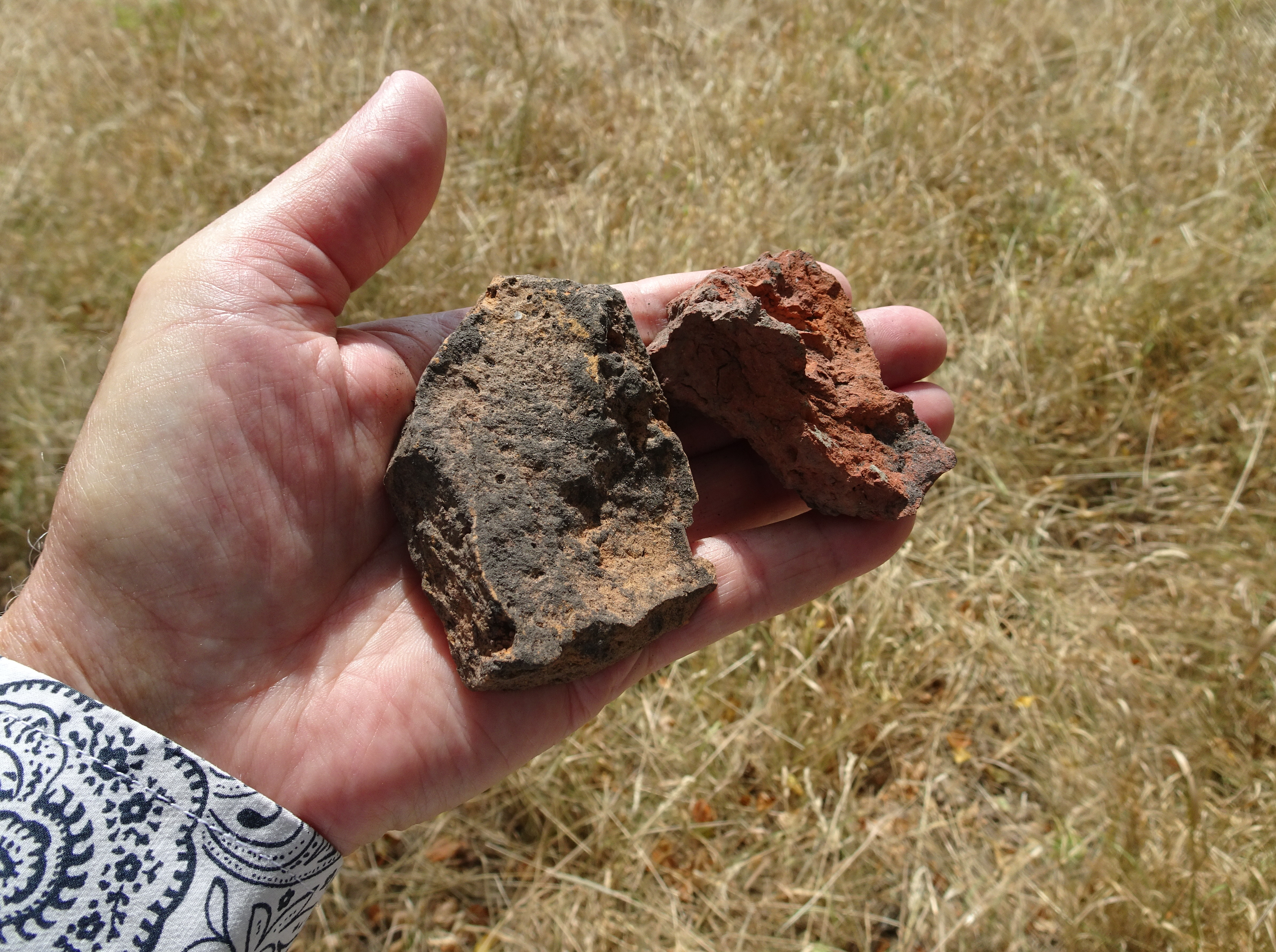 Ruiner efter Husaby-Enhörna kungsgård. Tegelfragment efter taktegel (t.v) och murtegel (t.h.)